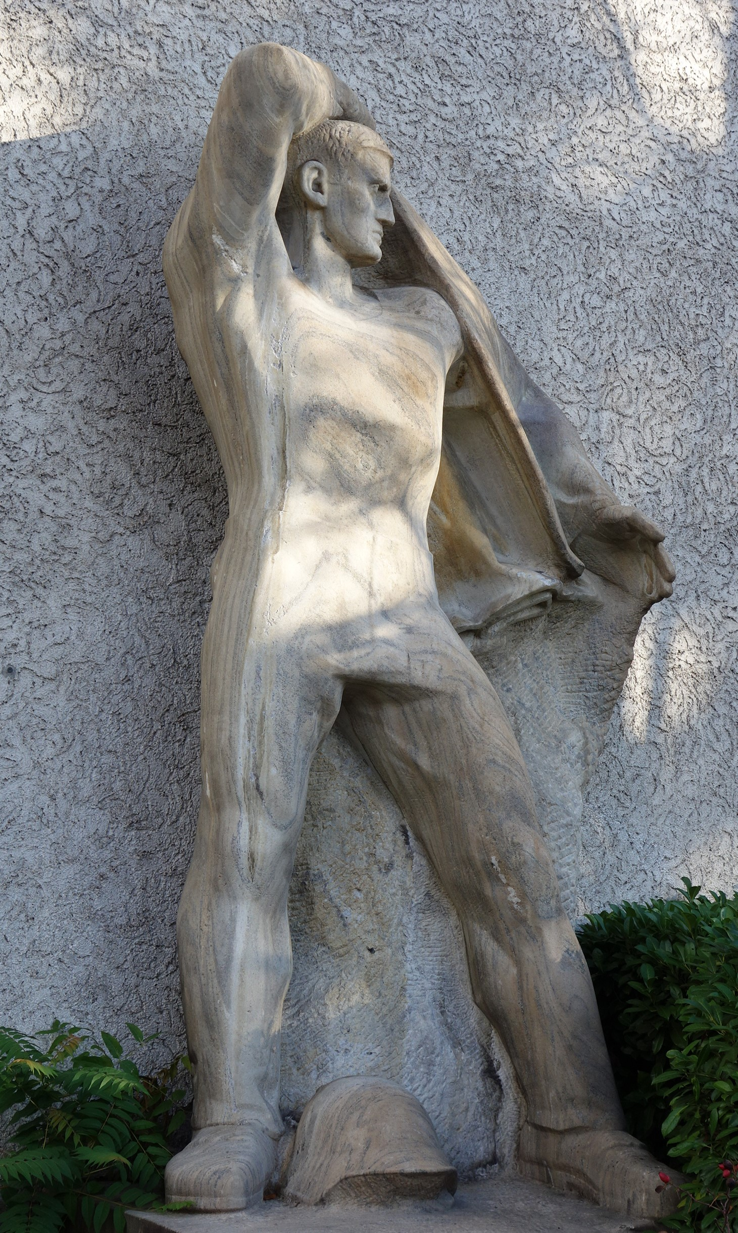 Wehrbereitschaft, Rämistrasse 80, Zürich-Hottingen, Schweiz